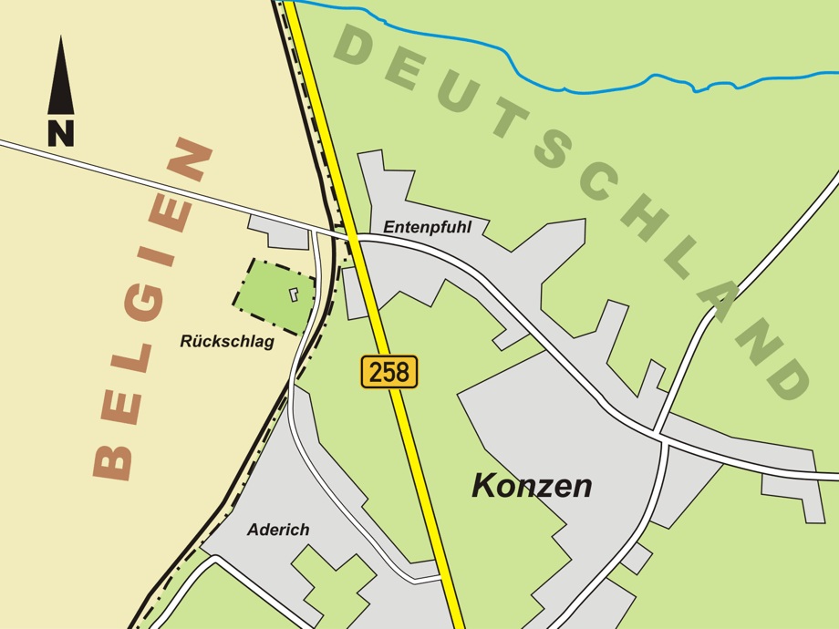 Karte der deutschen Exklave Rückschlag in Belgien